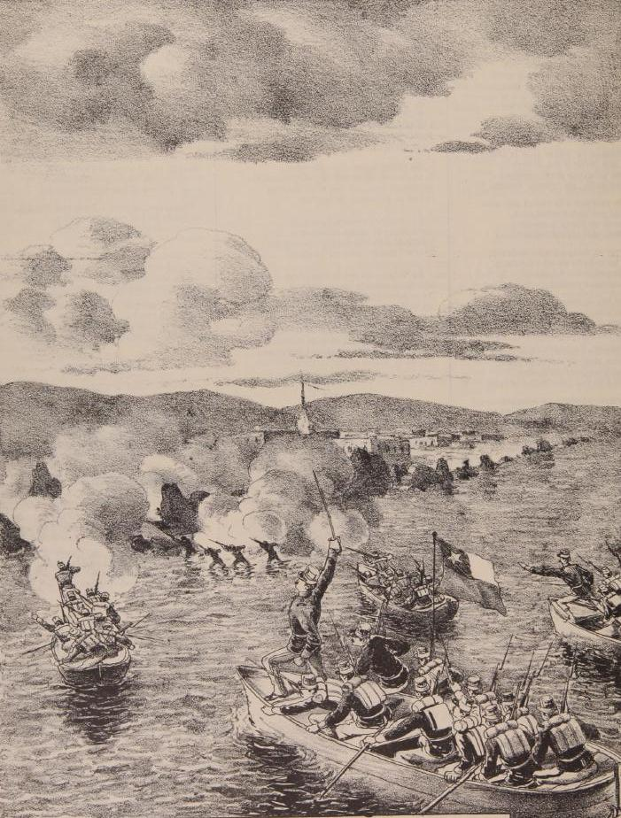 El Desembarco en Pisagua o Combate de Pisagua es una acción bélica en el marco de la Guerra del Pacífico, ocurrida el 2 de noviembre de 1879. Se trata de una operación de desembarco de tropas chilenas que dio comienzo a la campaña terrestre de la guerra en territorio peruano. La operación culminó con la ocupación de Pisagua, pese a la decidida defensa de los aliados.